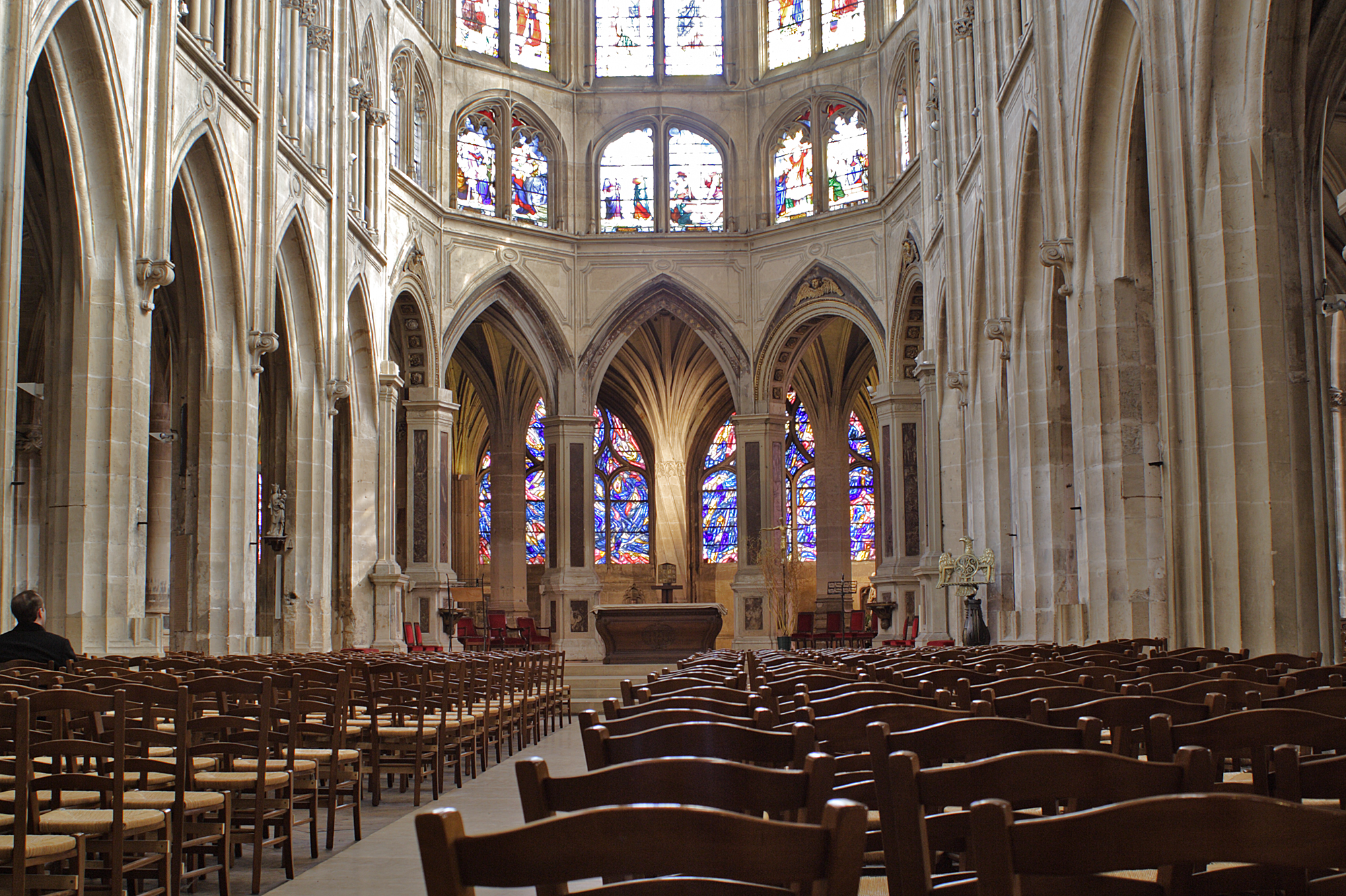 Mittelschiff von Saint Severin, Paris